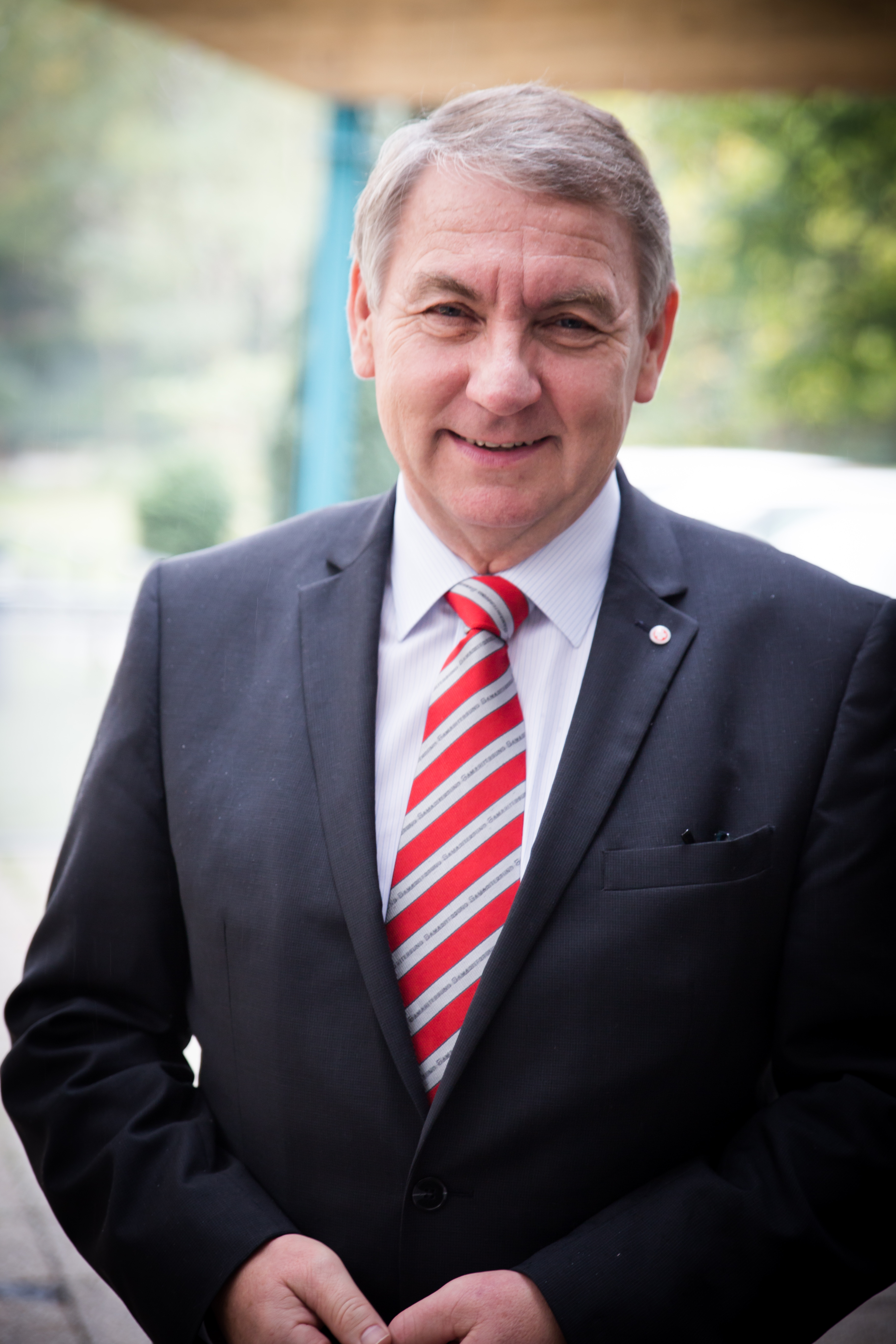 Reinhard Hundsmüller, Bundesgeschäftsführer Arbeiter-Samariter-Bund Österreichs